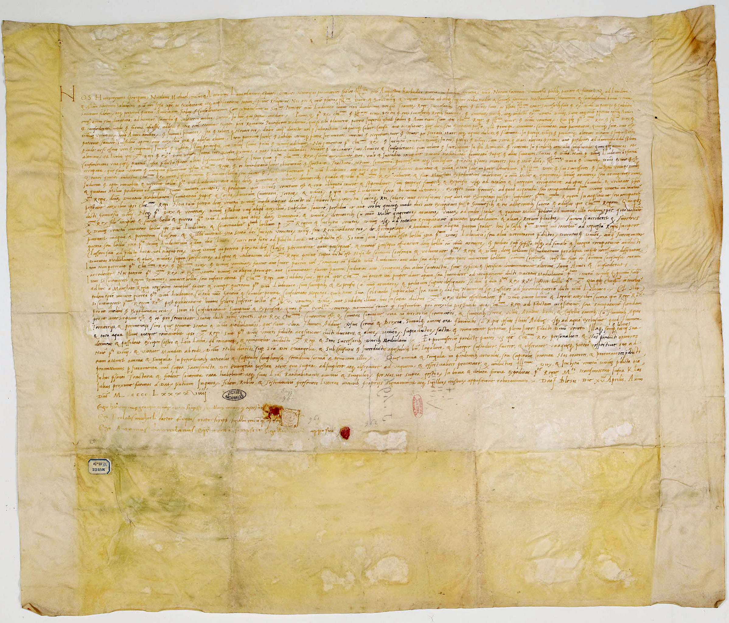 Traité de paix établi entre Louis XII, roi de France, et Agostino Barbarigo, Doge de Venise. Acte en langue latine, signé à Blois, le 15 avril 1499.